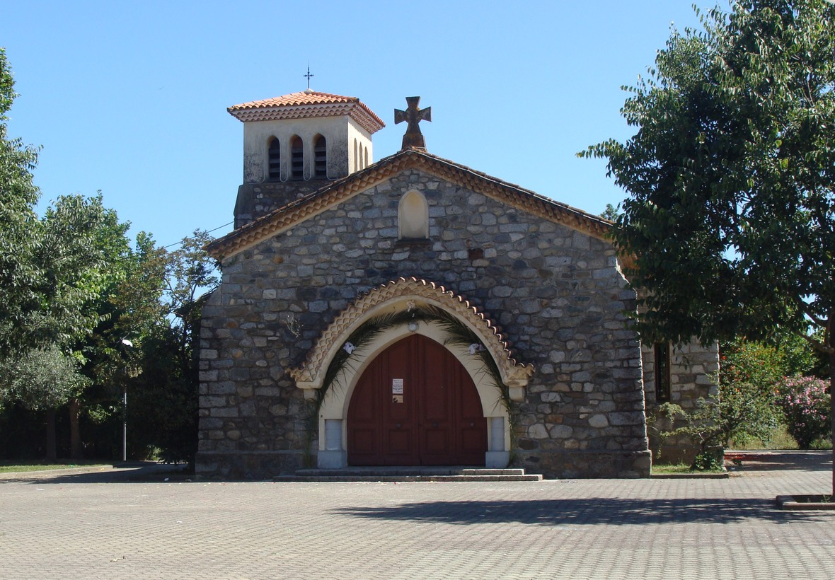 L'église de Migliacciaro (commune de Prunelli-di-Fiumorbo).